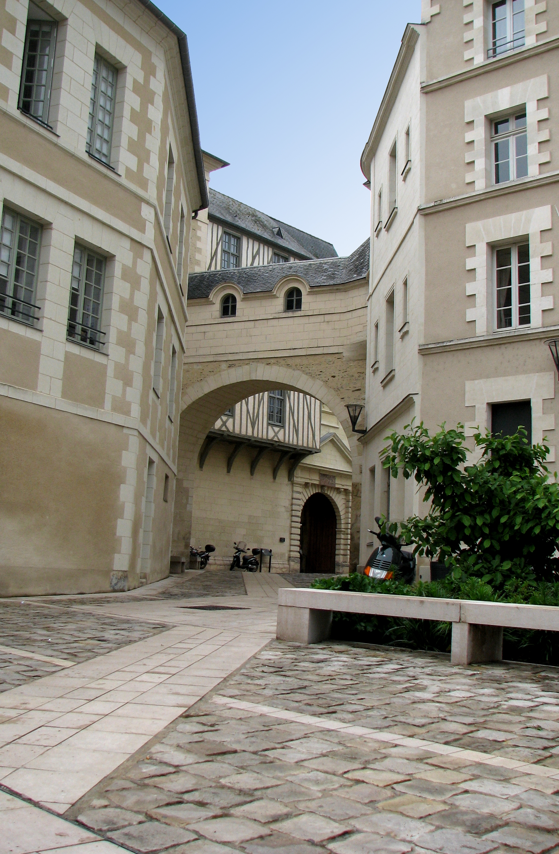 La loggia voûtée du logis Barrault à Angers (rue du musée).